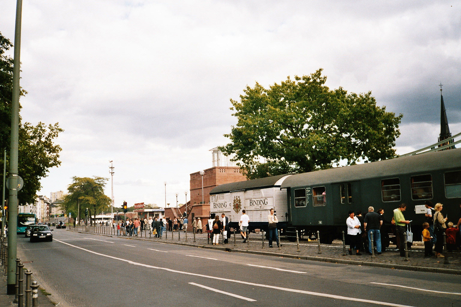 Personenzug auf der Hafenbahn am Mainufer anlässlich des „Tags der Verkehrsgeschichte“